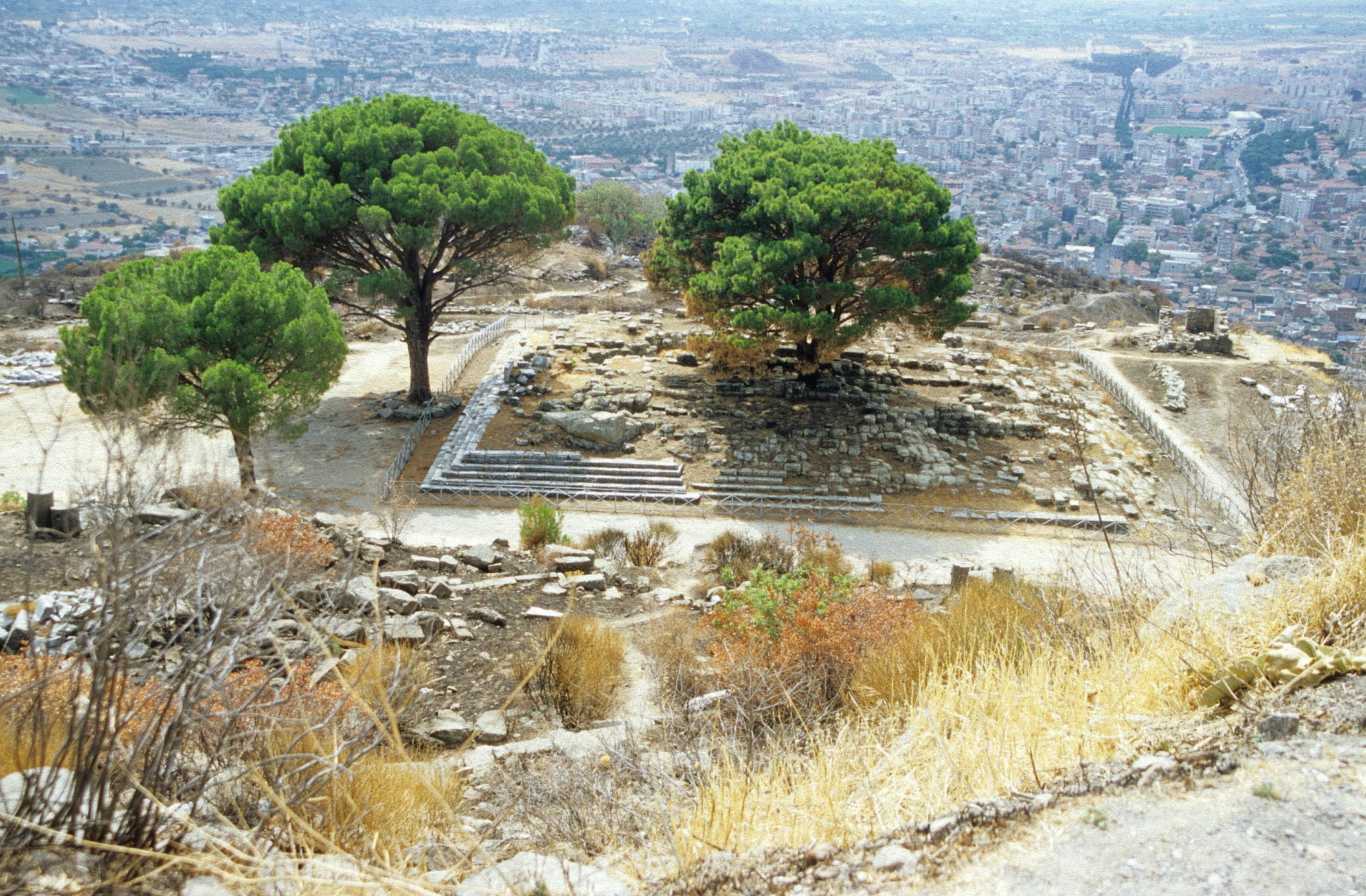 Pergamon, Westtürkei, Sockel des Zeusaltars